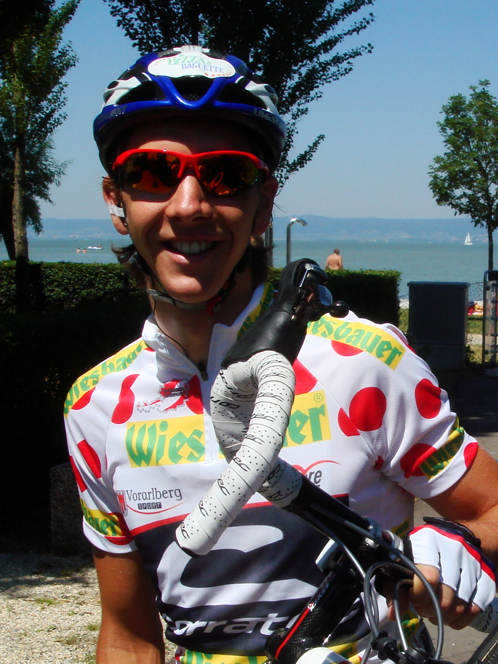 Josef Benetseder, ciclista austríac